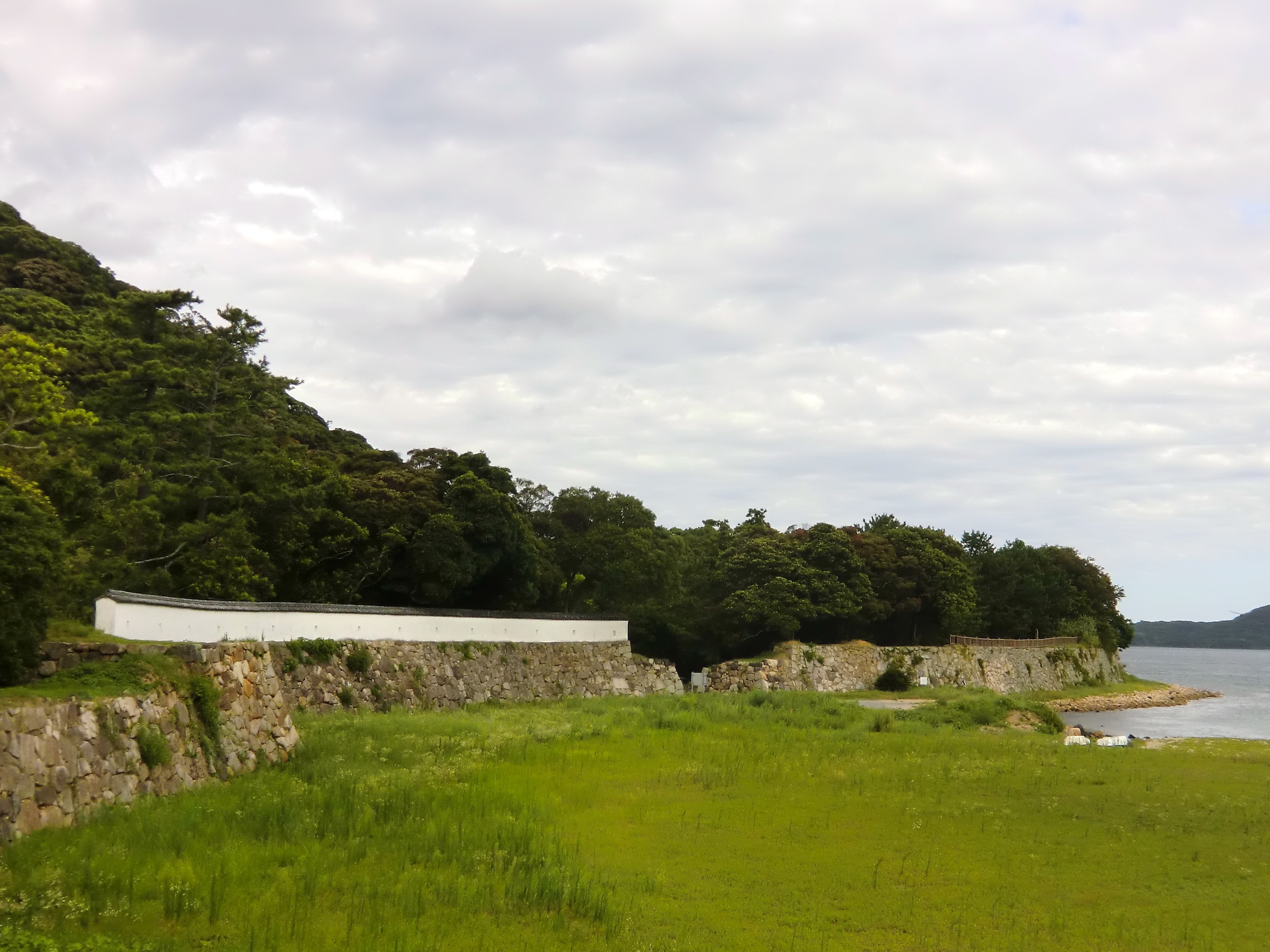 指月山にある本丸の復元土塀（山口県萩市）